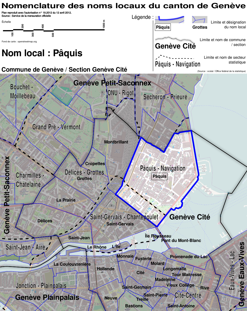 Nomenclature des noms locaux du canton de Genève, généralement appelés "Lieux-dit". Cette nomenclature a été recueillie entre 1932 et 1953 lors de la création du Plan d'Ensemble (PE) du canton de Genève. Plan reproduit avec l'autorisation n° 19.2012 du 12 avril 2012. Source : Service de la mensuration officielle.